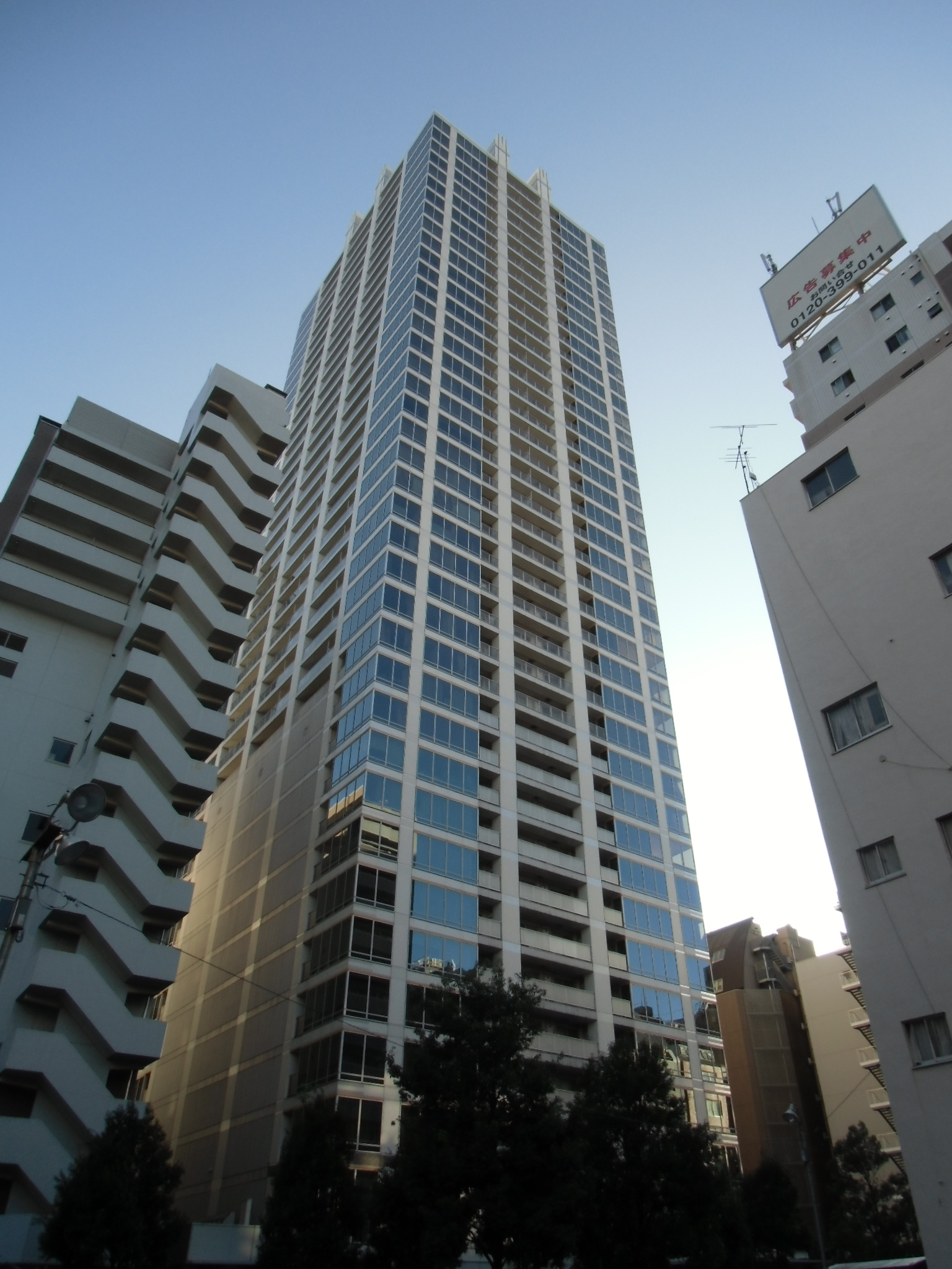 秋葉原地区再開発で建設された超高層マンション「TOKYO TIMES TOWER」